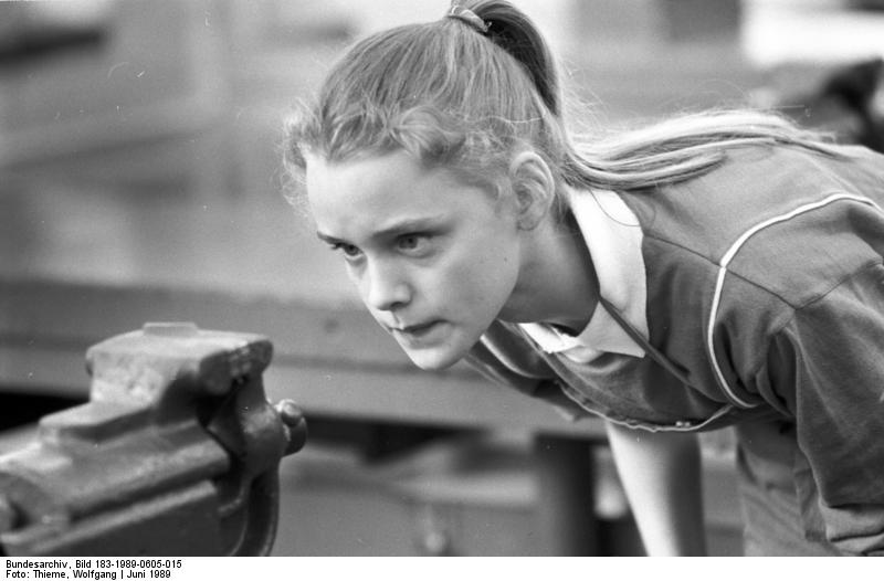 Karl-Marx-Stadt, polytechnischer Unterricht ADN-ZB/Thieme 5.6.89 Bez. Karl-Marx-Stadt: Lieber zweimal richtig gemessen, als einmal zuviel weggefeilt, sagt sich Claudia Rothe aus der 7. Klasse der Dieserweg-Oberschule in Karl-Marx-Stadt. Polytechnischen Unterricht im Fach Metallbearbeitung erhält sie mit ihren Klassenkameraden im polytechnischen Zentrum des VEB Robotron Buchungsmaschinenwerk, das seit 1956 existiert. Seither hat sich das Zentrum zu einer anspruchsvollen Bildungsstätte für die produktive Arbeit der 7.-10. Klassen profiliert. An das Erlernen der Grundfertigkeiten in der Metallbearbeitung schließen sich für die Schüler erste Montagearbeiten, z.B. an Tastaturen von Schreibmaschinen, an. Werkzeugmaschinenausbildung für die 9. Klassen und komplizierte Montagearbeiten an Bürocomputern an der Seite von Lehrfacharbeitern in Produktionsabteilungen vervollständigen für die 10. Klassen die Ausbildung.